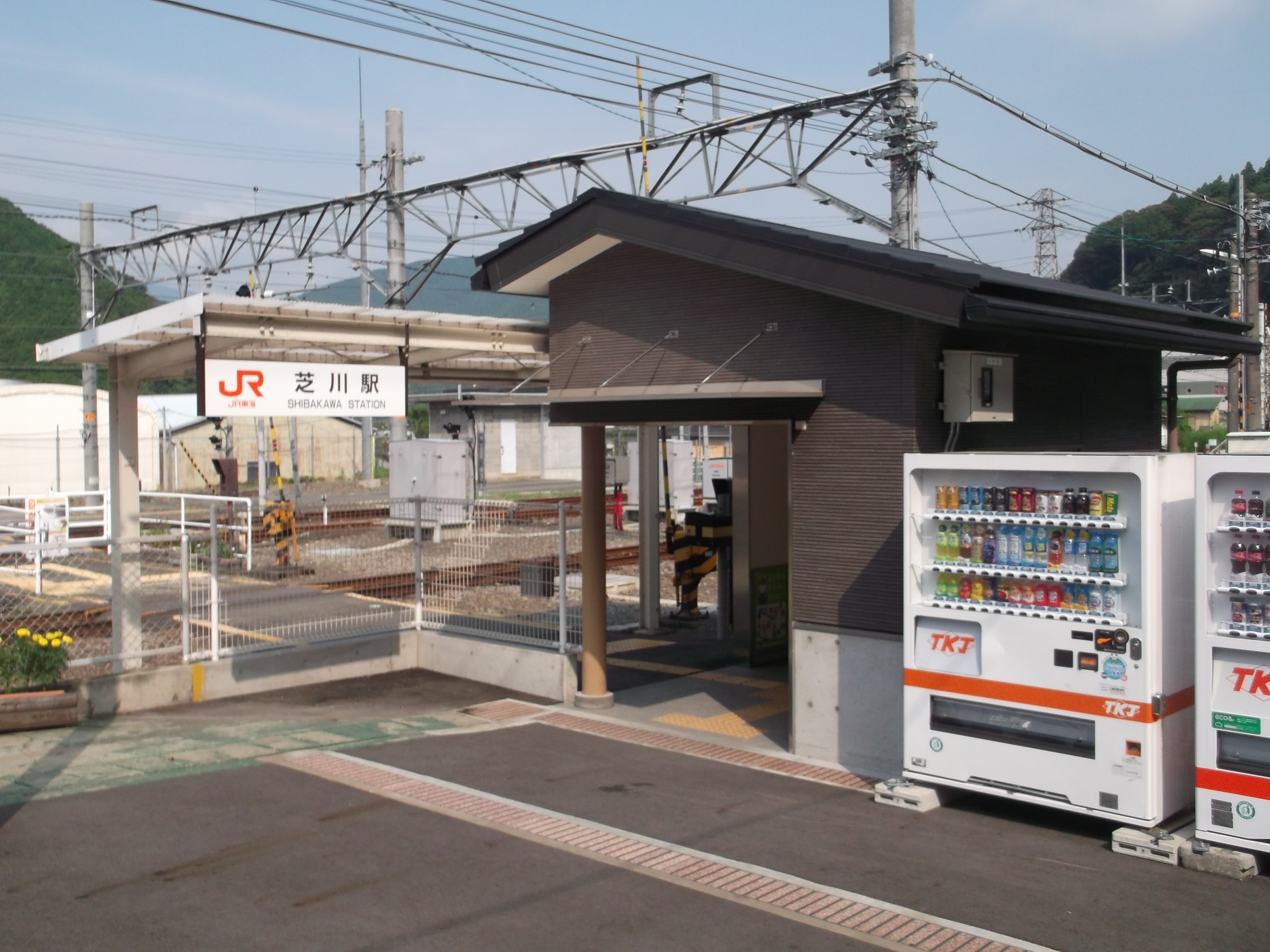 JR身延線 芝川駅